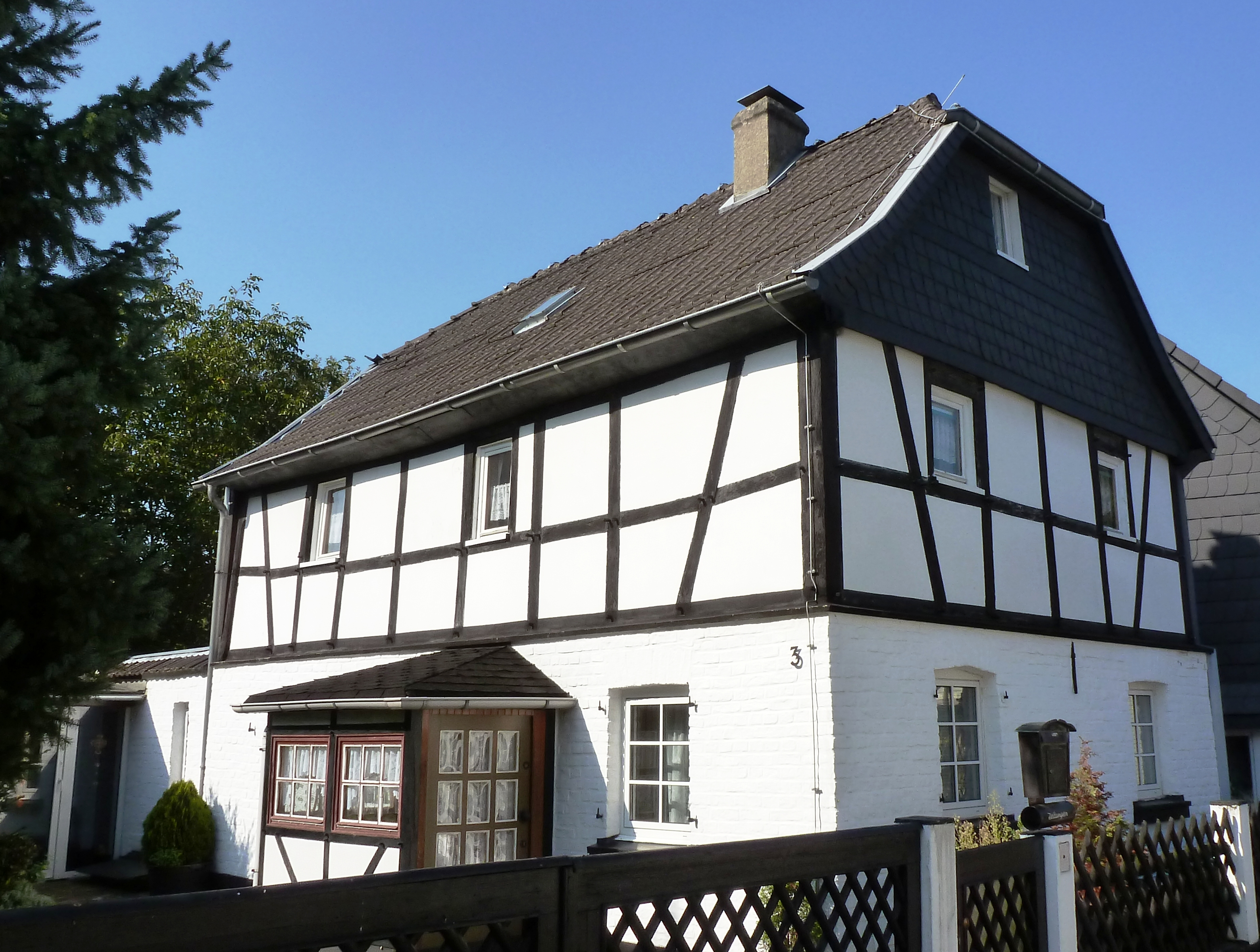 Haus In der Hütte 3 in Köln-HolweideThis is a photograph of an architectural monument.